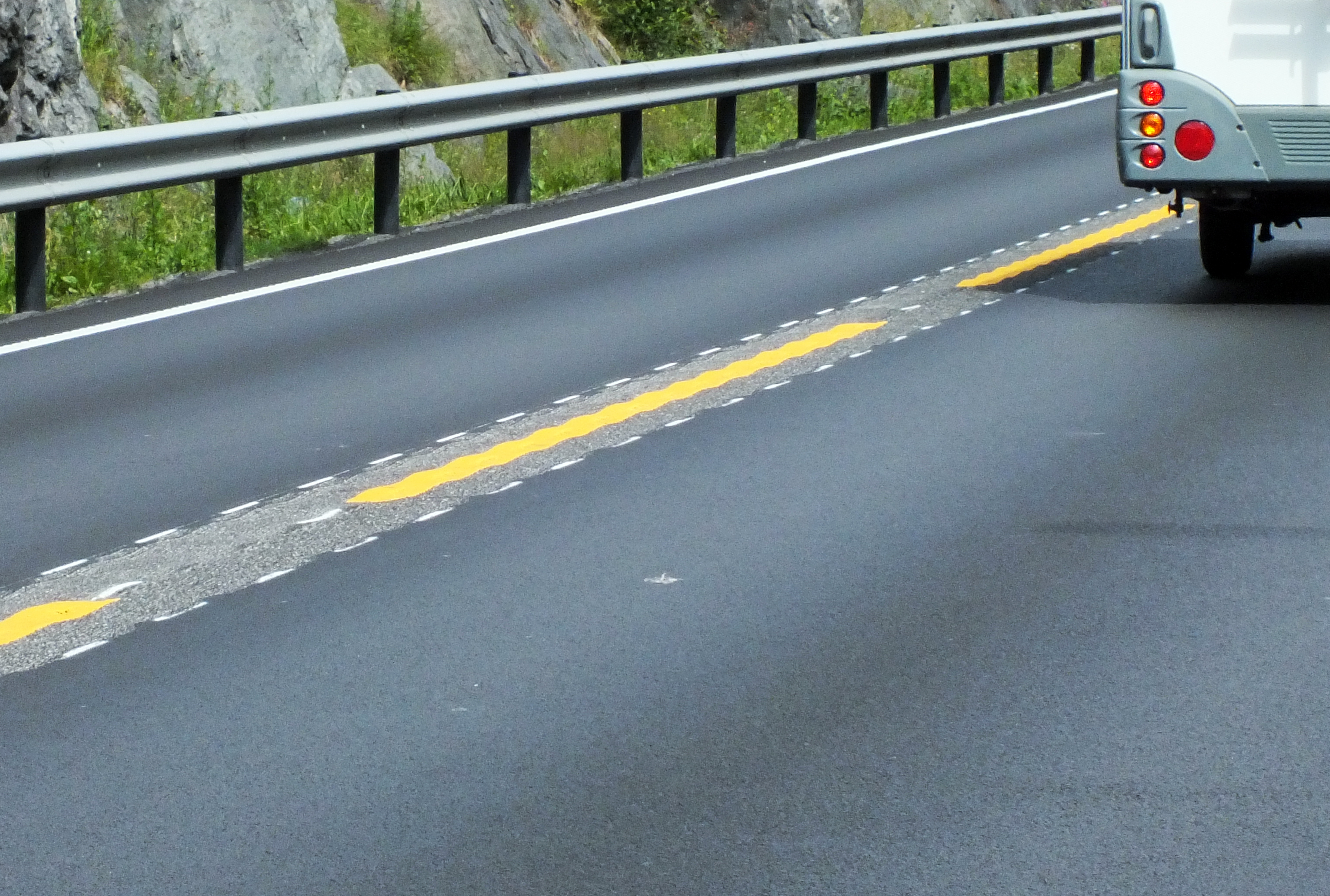 Et rumlefelt mellom filene på E 18. Når hjulet på kjøretøyet kommer over rumlefeltet oppstår både en lyd og en dirrende følelse i kjøretøyet